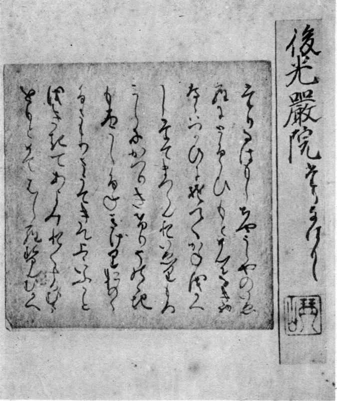 伝・後光厳院筆『竹取物語』断簡の一葉。 「たりなはもし」から「はしらせんむかへ」までが記されている。 京都・毘沙門堂旧蔵（現在の所蔵は不明）。 新井信之『竹取物語の研究 本文篇』（国書出版、1944年）より、投稿者自身がスキャンしたもの。